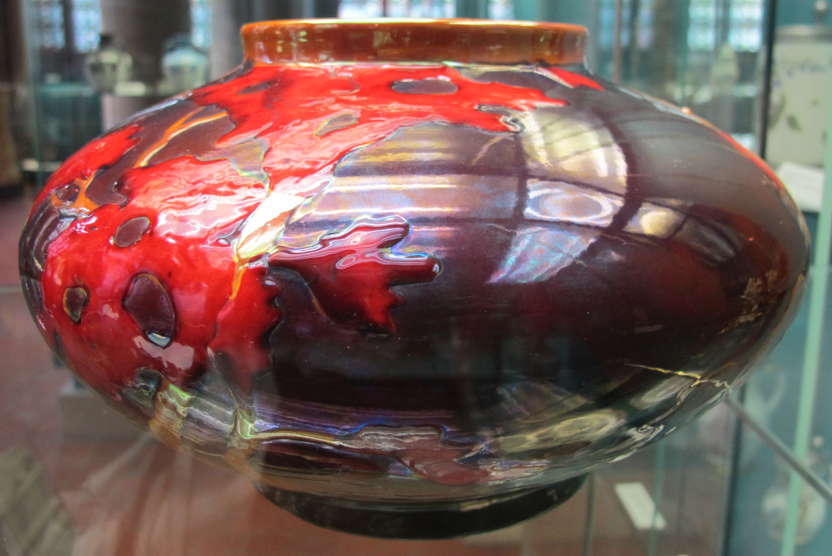 Vilmos zsolnay, vaso, pécs, fine XIX sec.